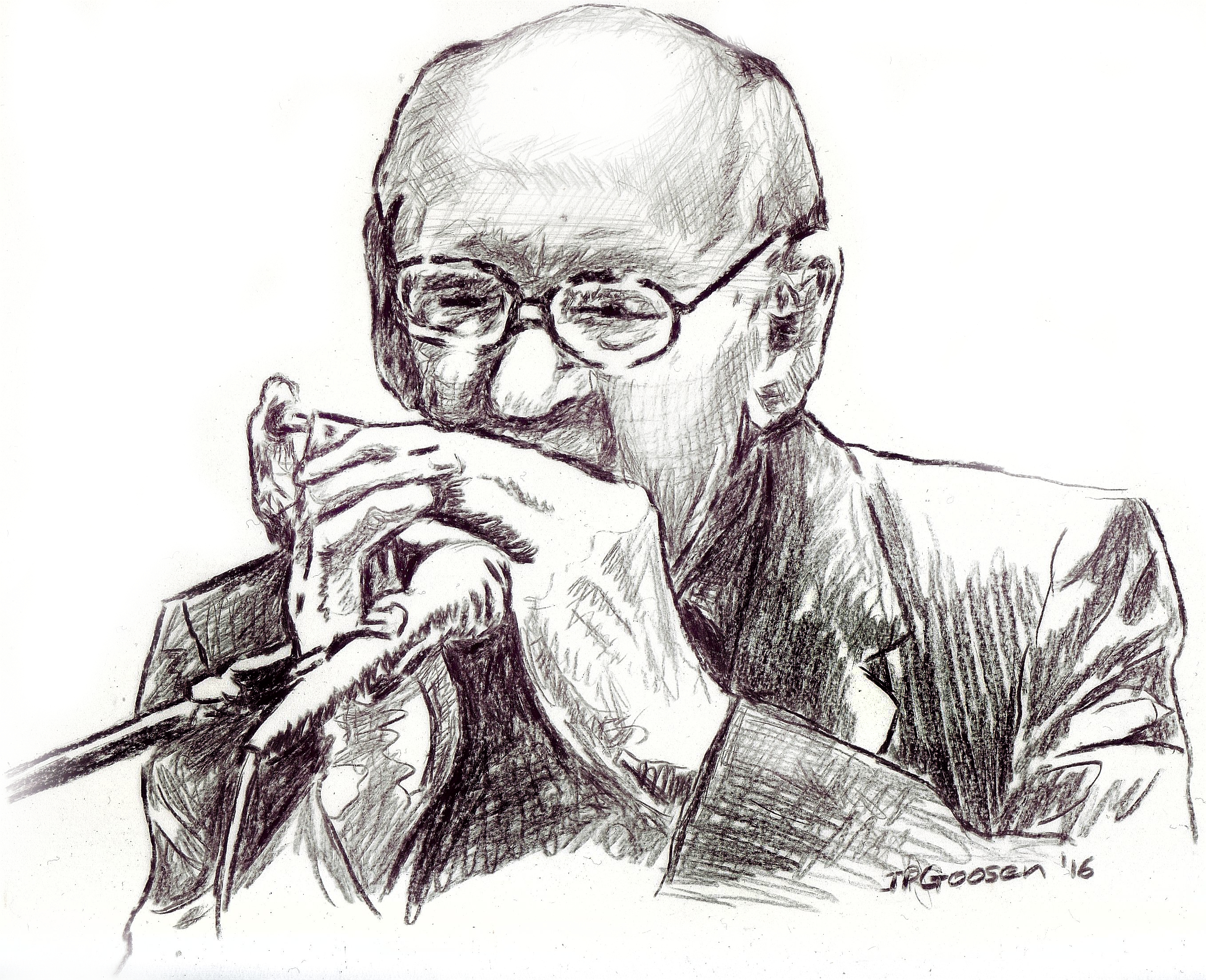 Tekening van Vincent van Rooyen wat mondfluitjie speel voor 'n mikrofoon